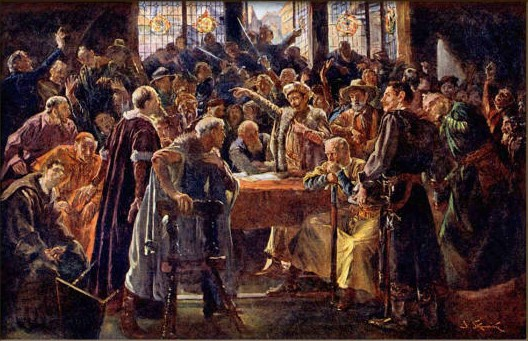 Jan Skramlík (1860-1936) - Čáslavský sněm v červnu 1421